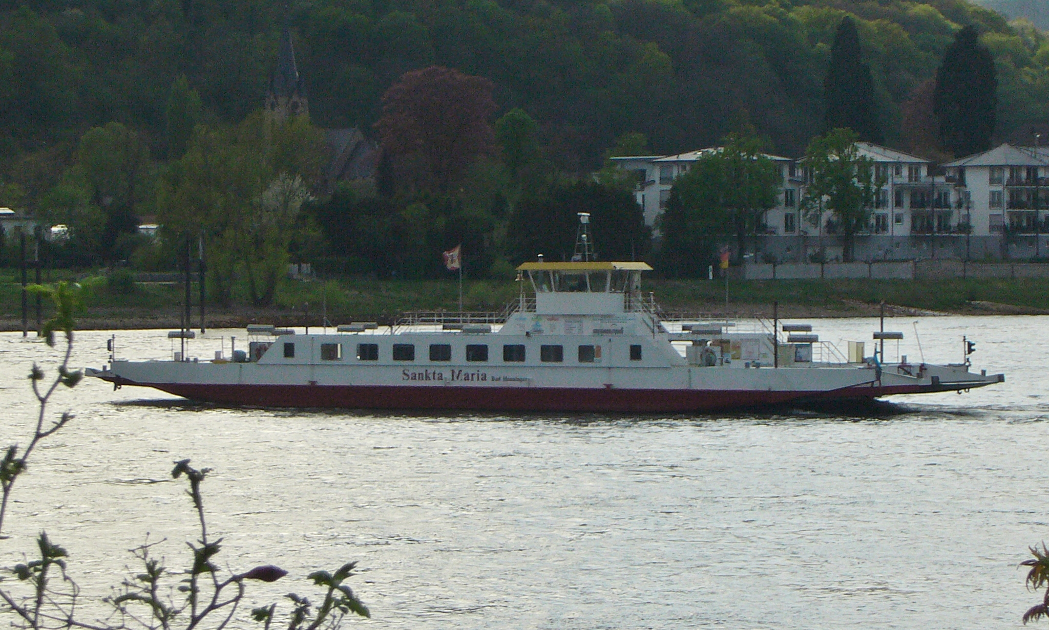 Rheinfähre Sankta Maria, Bad Hönningen